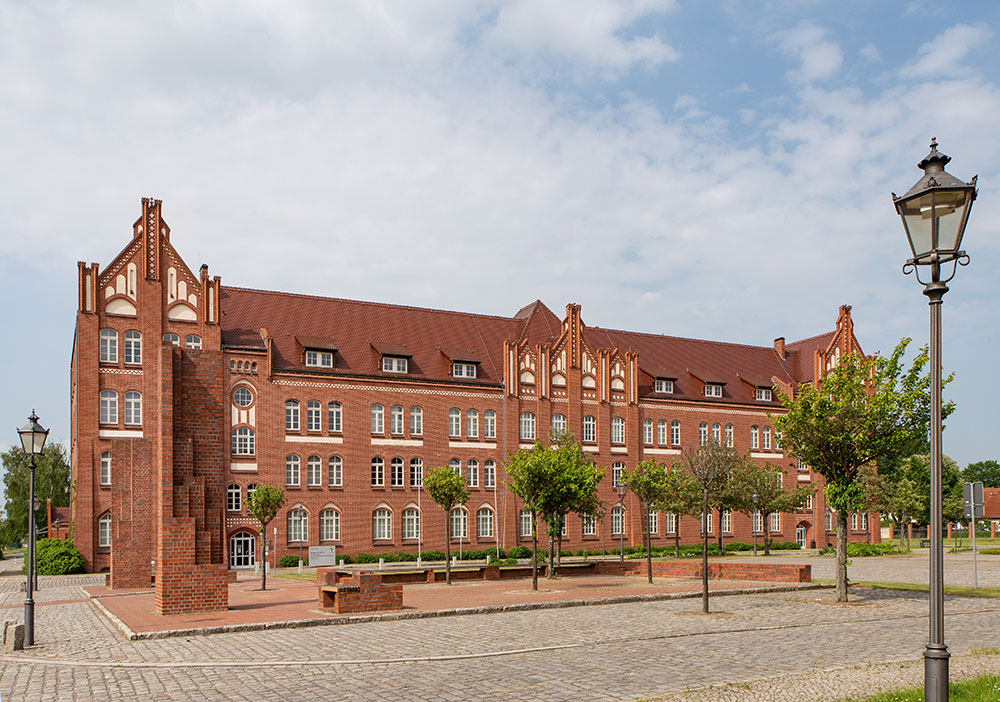 Stendal Scharnhorststraße 40, Amtsgericht, Baudenkmal